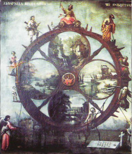 Nicolae Teodorescu - Roata lumii